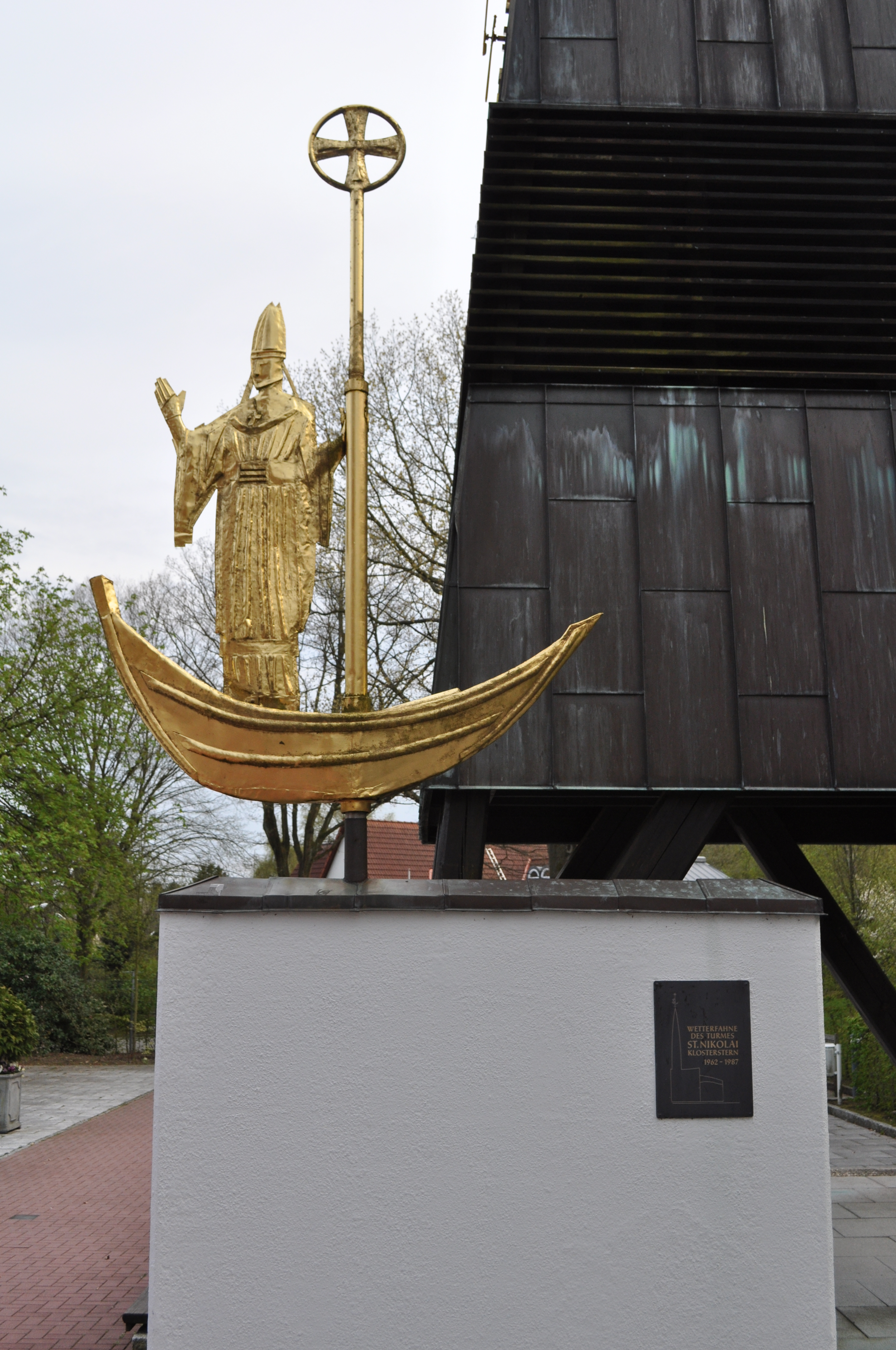 Ehemalige Wetterfahne der Hauptkirche St. Nikolai am Glockenturm auf dem Gelände des Hospitals zum Heiligen Geist in Hamburg-Poppenbüttel.